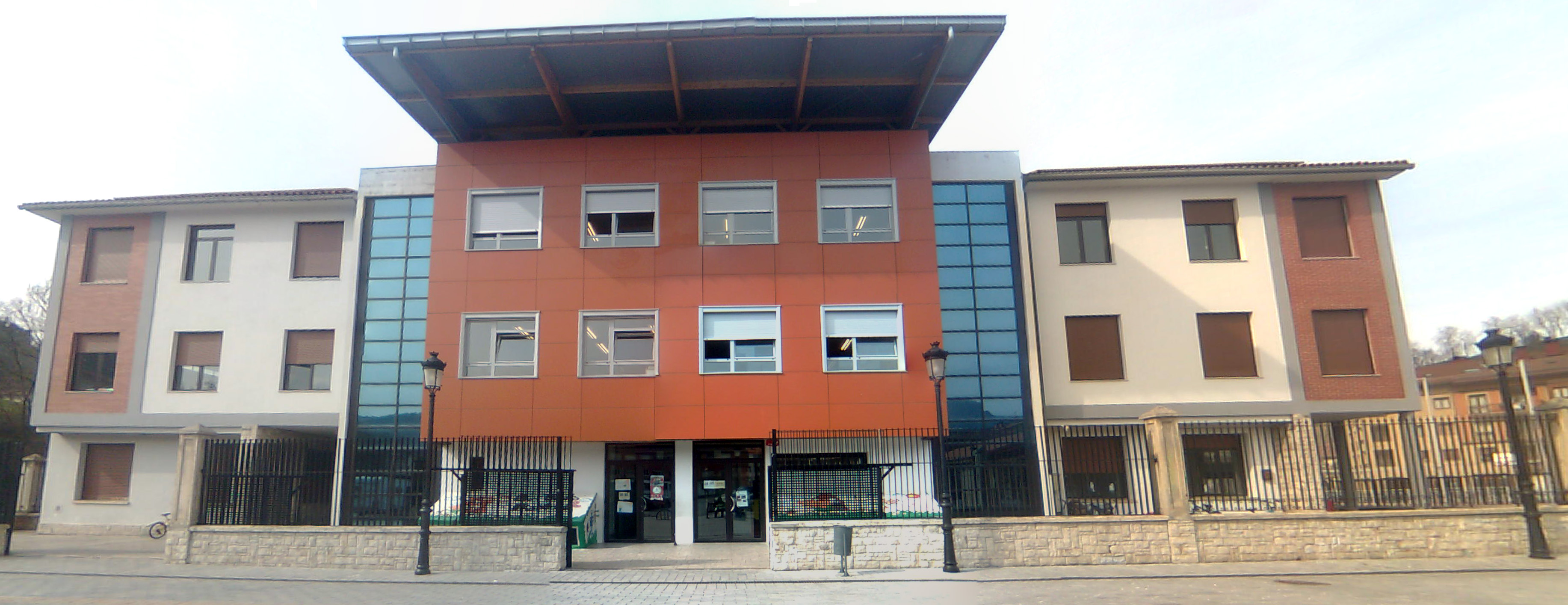 Lazkaoko ikastolaren eraikinaren irudia